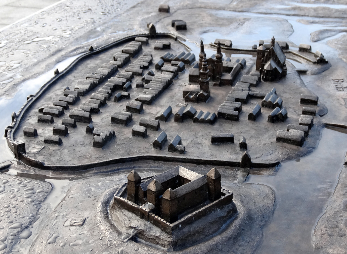 Płaskorzeźba miasta lokacyjnego Bydgoszczy z XVI-XVII w. stojąca na placu przy spichrzach